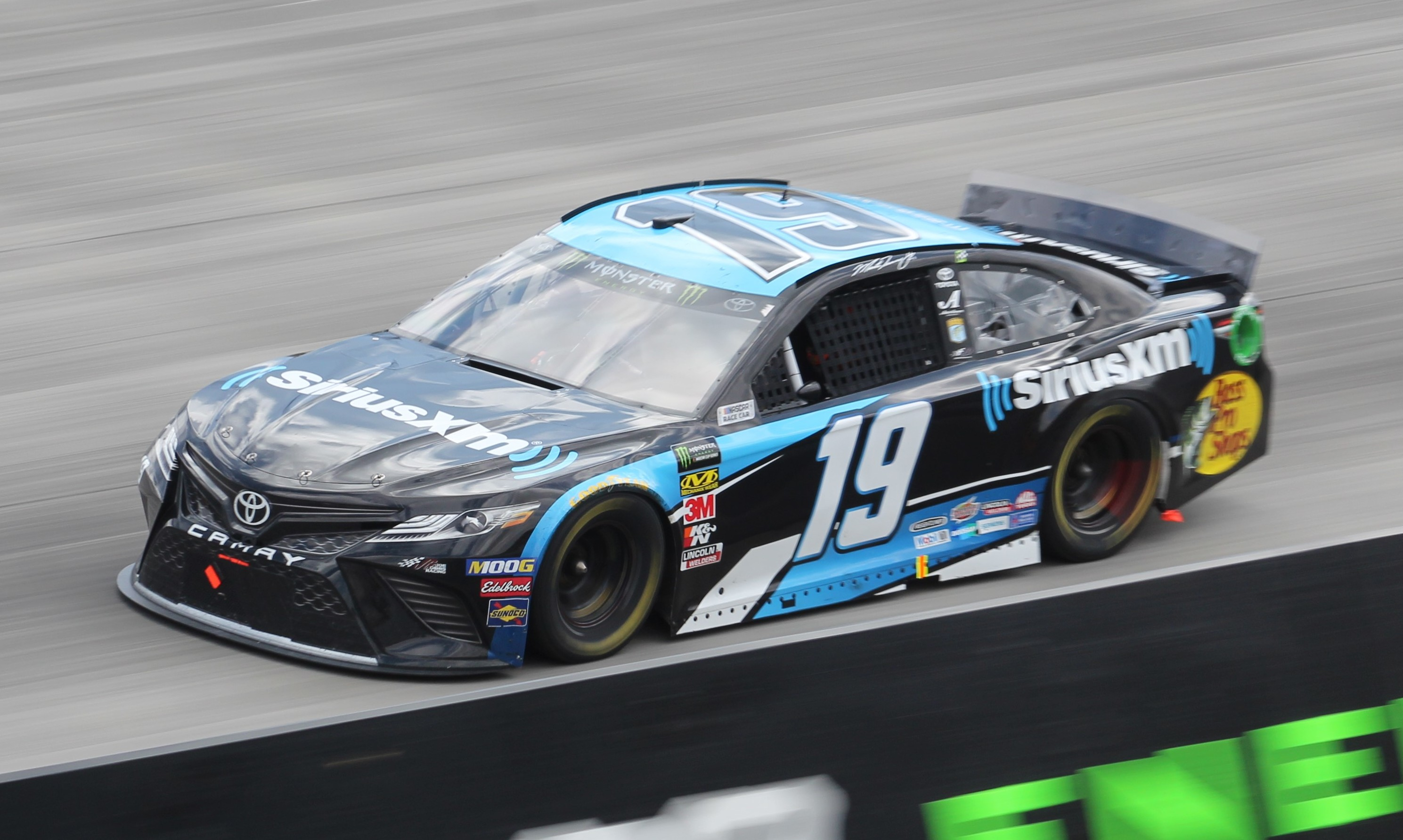 2019 Gander RV 400